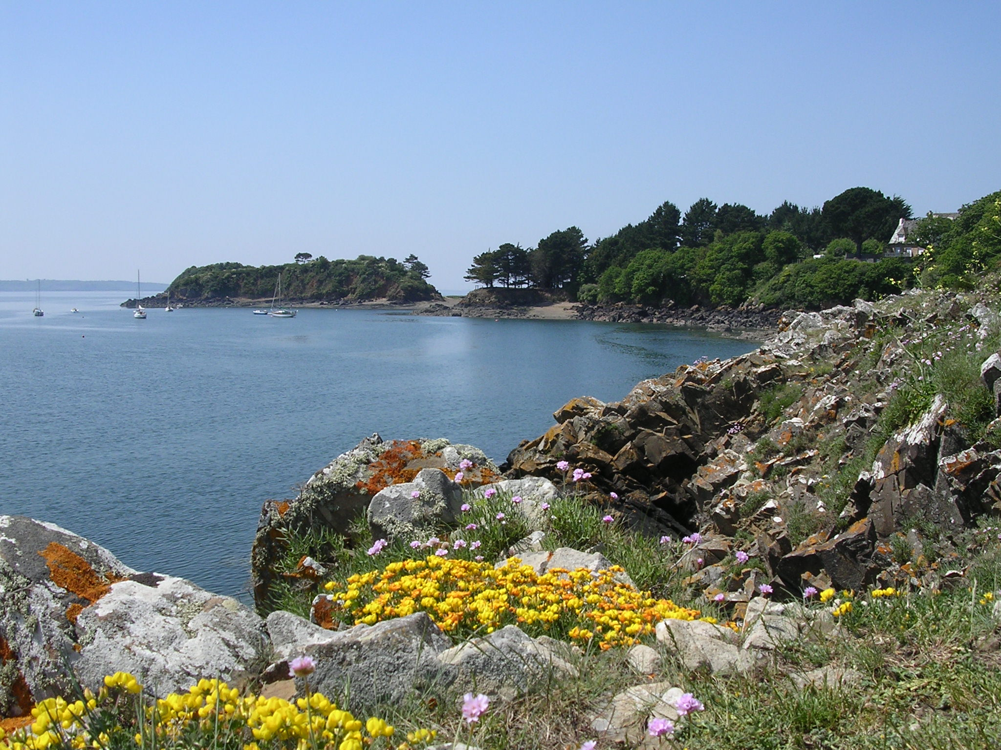 Pointe du Bendy Logonna-Daoulas